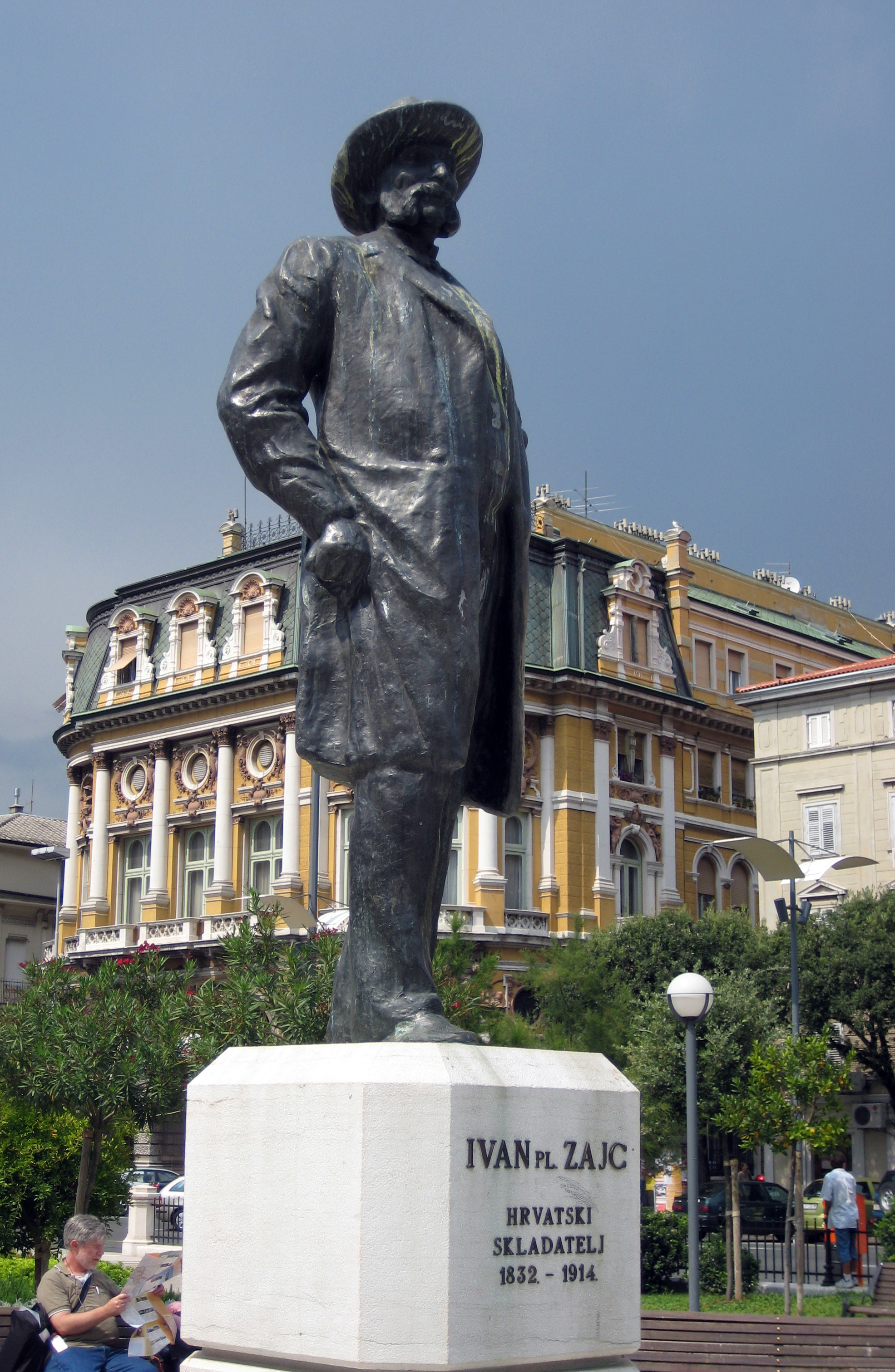 Spomenik Ivana plemenitog Zajca u Rijeci, Croatia